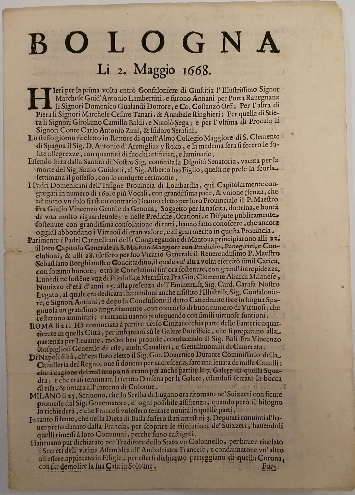 Gazzetta edita a Bologna, numero del 2 Maggio 1668